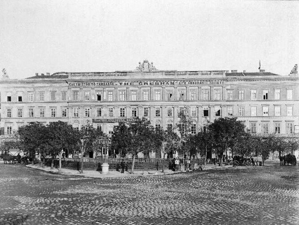 A Nákó-palota 1903-ban, lebontása előtt. - Budapest V. ker. Roosevelt tér